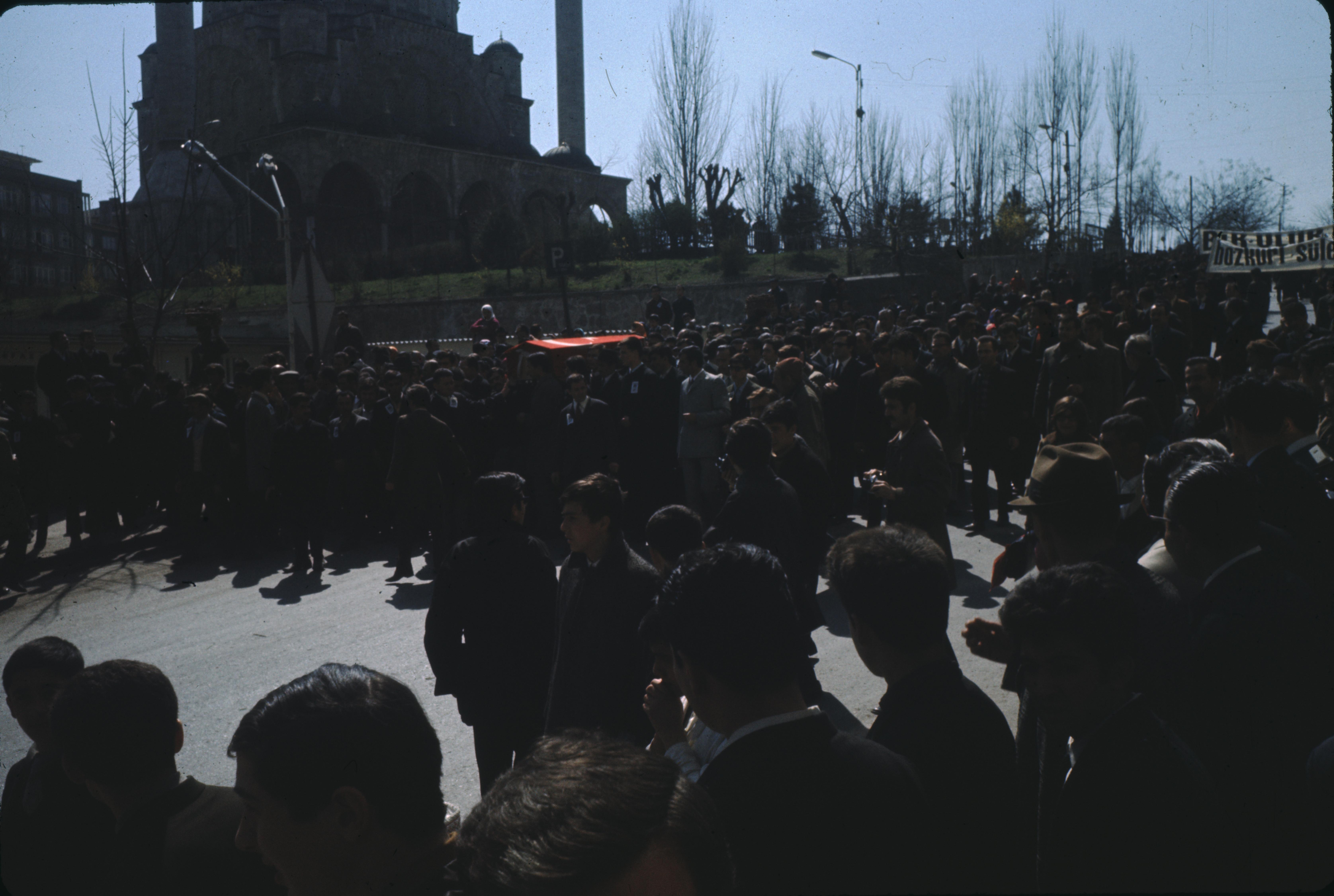 CyberViewX v5.16.55 Model Code=58 F/W Version=1.21